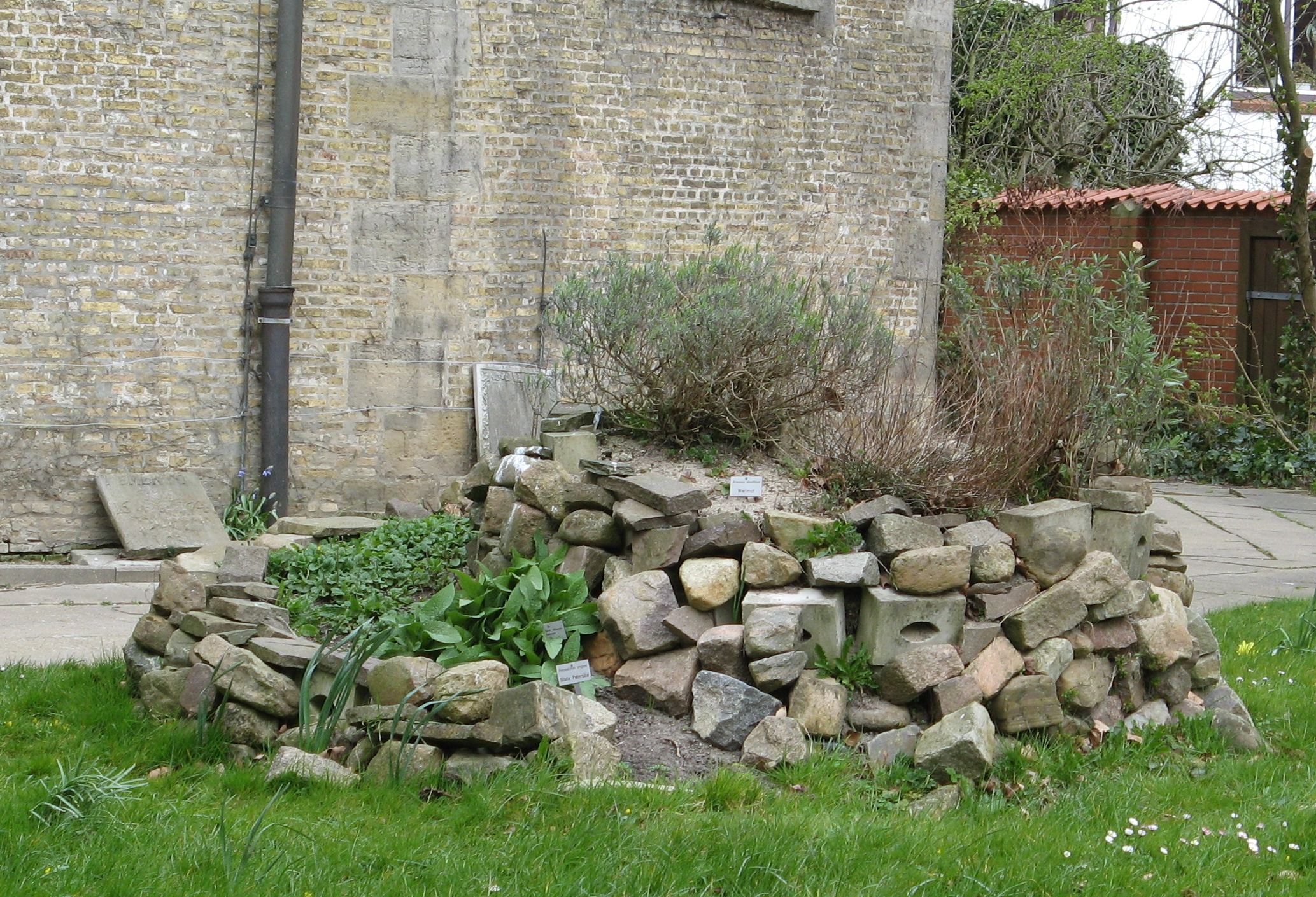 Kräuterspirale an der christophorus-kirche Author: Dirk Ingo Franke